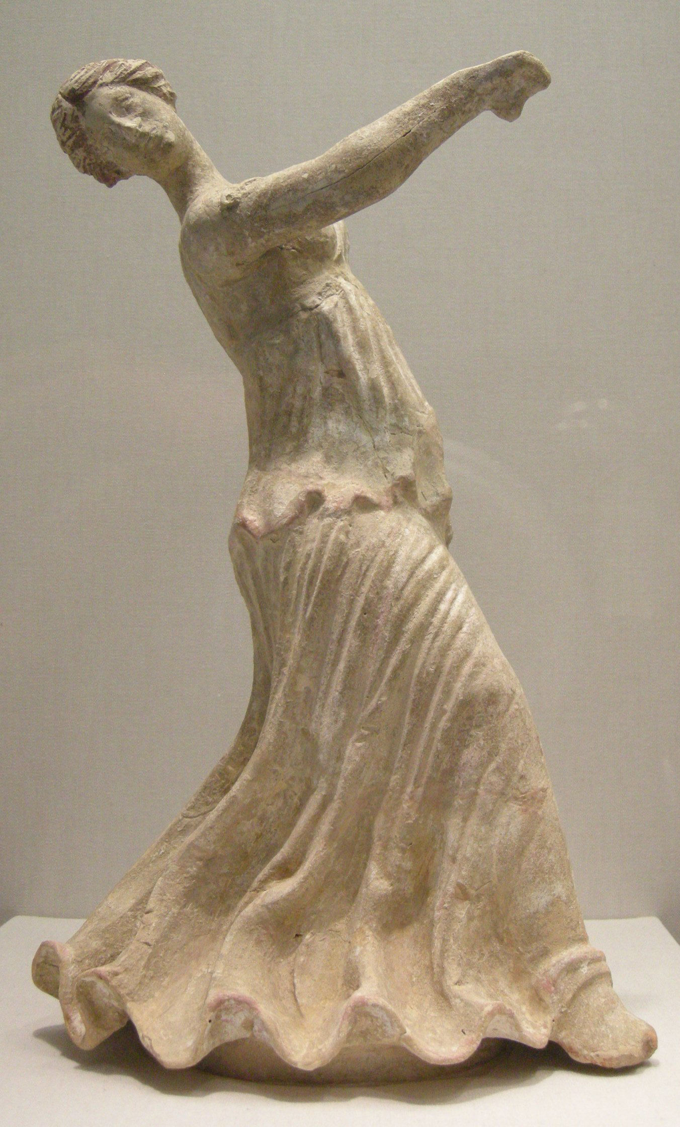 Arte magnogreca da centuripe, figura di danzatrice, II secolo a.c.